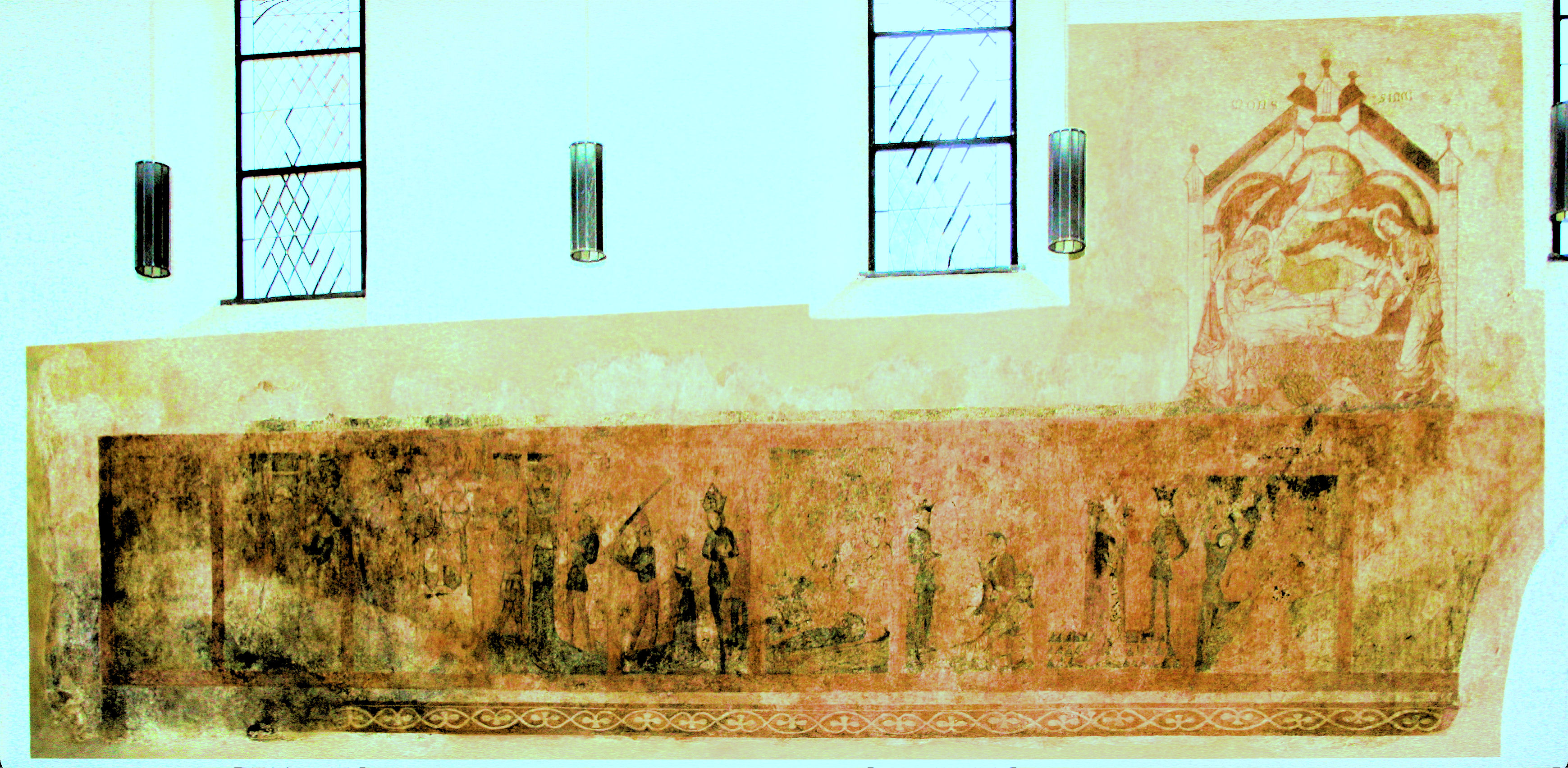 Stadt Blankenberg, St. Katharina, Fresko